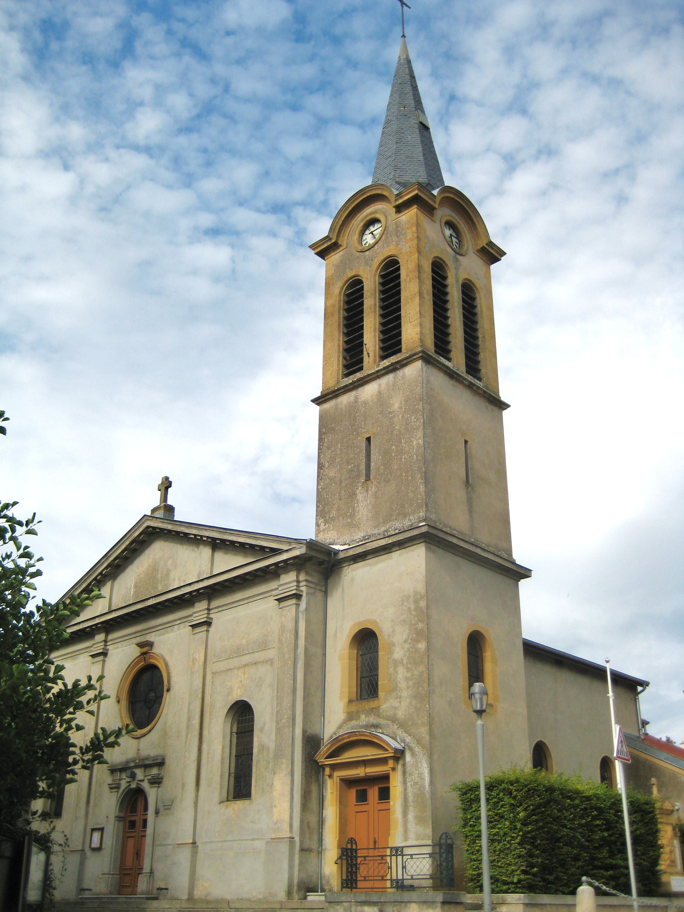 Description église Saint-Pierre-Apôtre de Moulins-lès-Metz Date26 August 2011Sourcemon appareil photoAuthorAimelaimePermission(Reusing this file) église Saint-Pierre-Apôtre de Moulins-lès-Metz